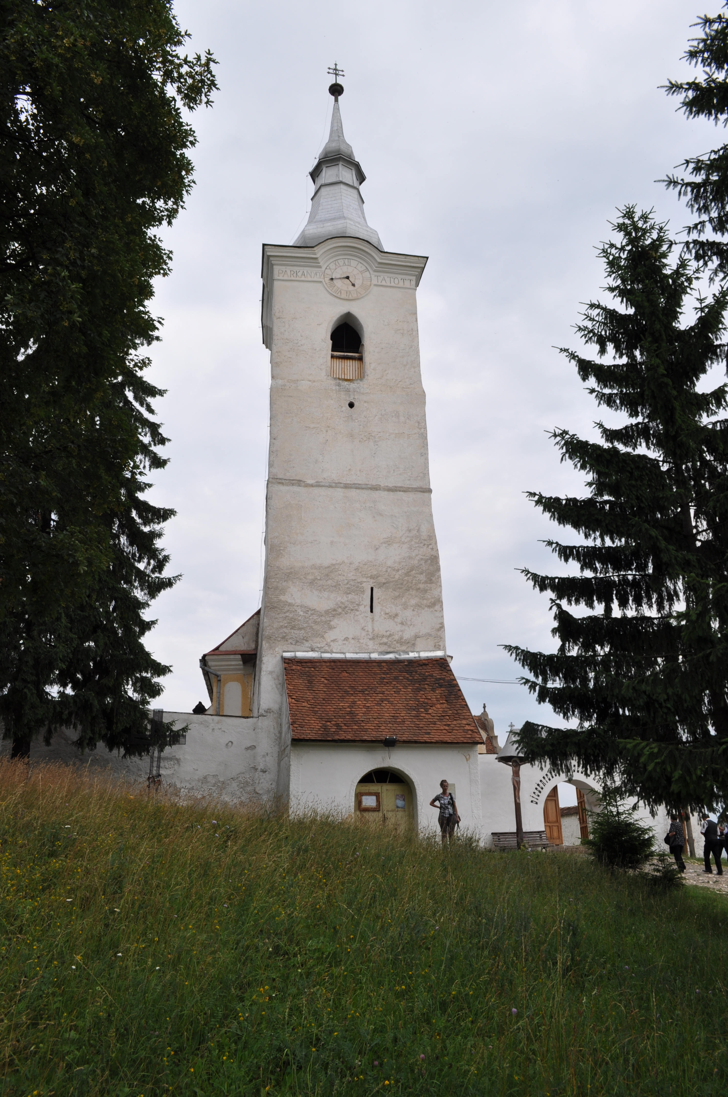 Lăzarea, județul Harghita